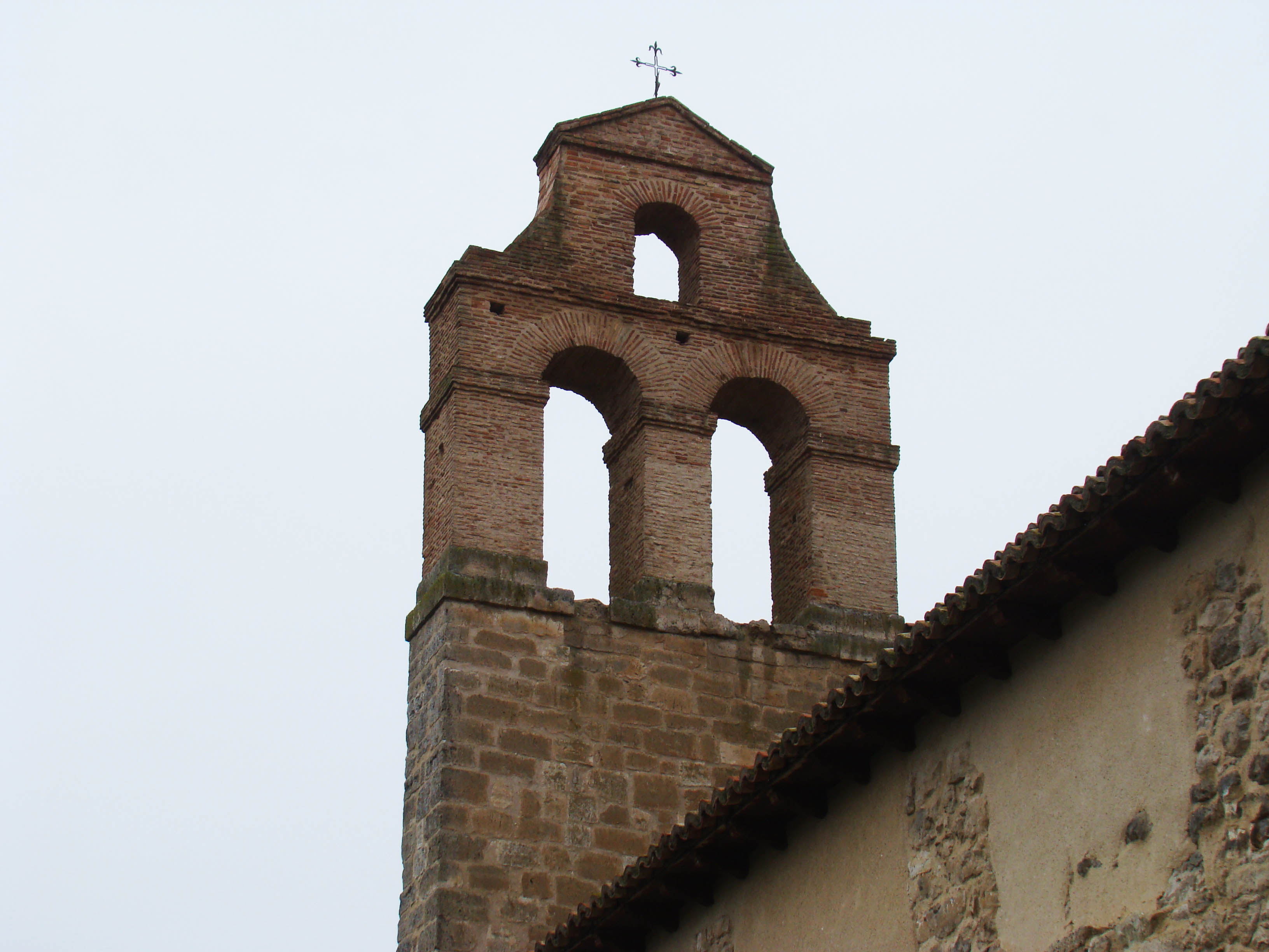 Monasterio de Palazuelos en la provincia de Valladolid. Espadaña del siglo XVI.